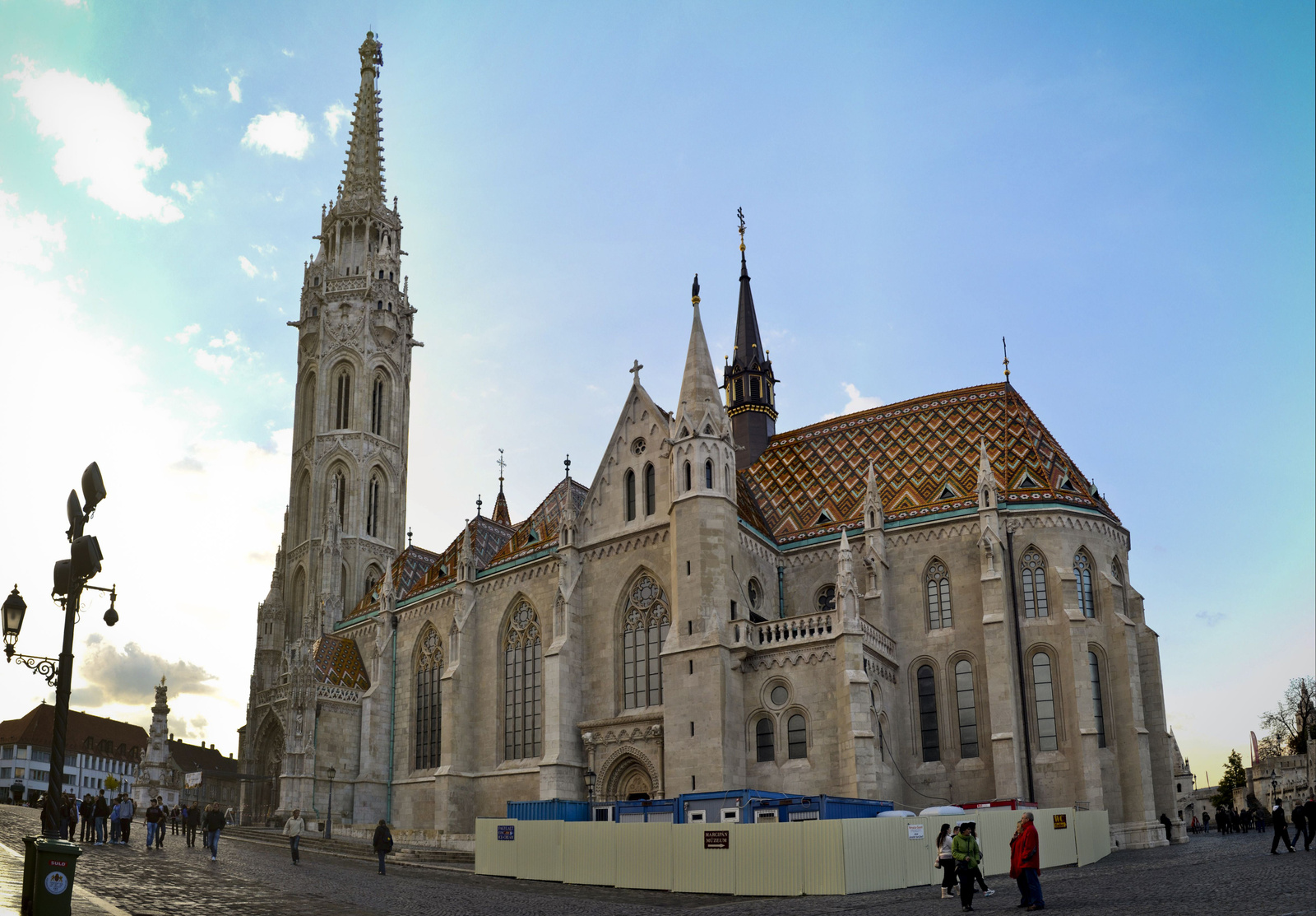 Mátyás templom (Budapest 1, Szentháromság tér) This is a photo of a monument in Hungary. Identifier: 139